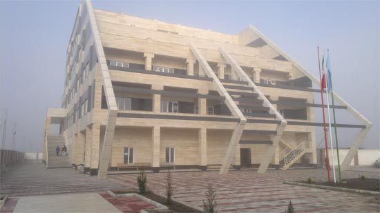 نمای ساختمان موسسه آموزش عالی شرق گلستان